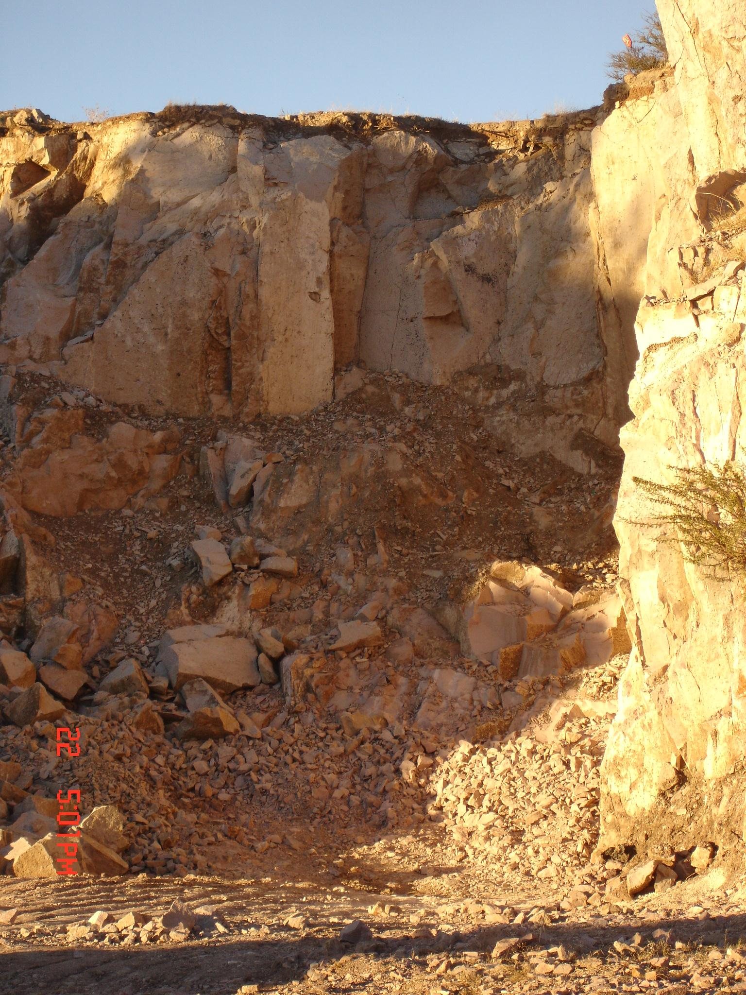 cantera rosa en San Miguel el Alto